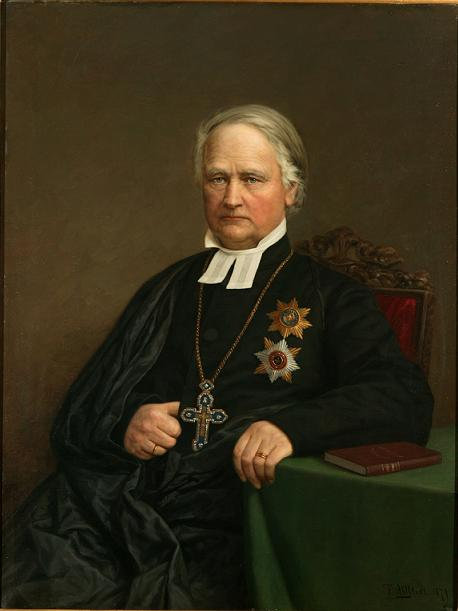 Архиепископ Турку Эдвард Бергенхейм